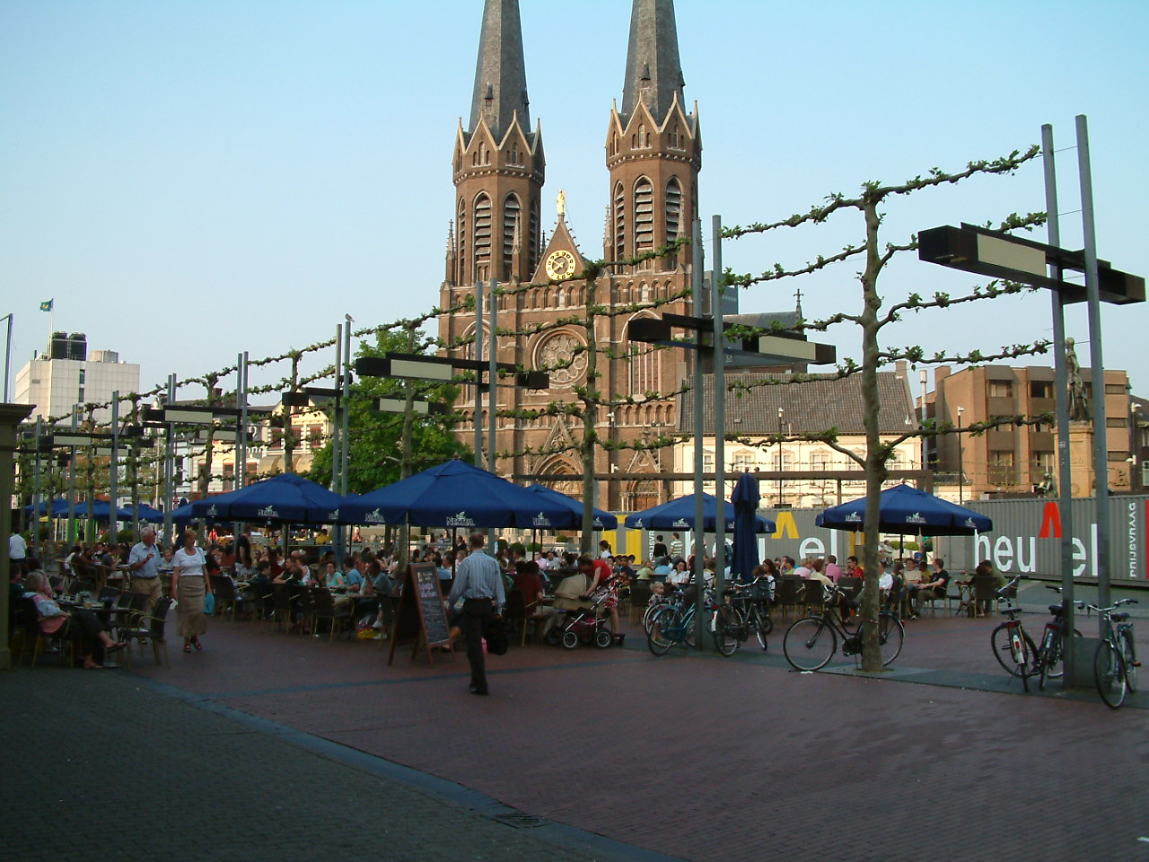 Heuvel in centrum Tilburg 11 mei 2006 Foto 11